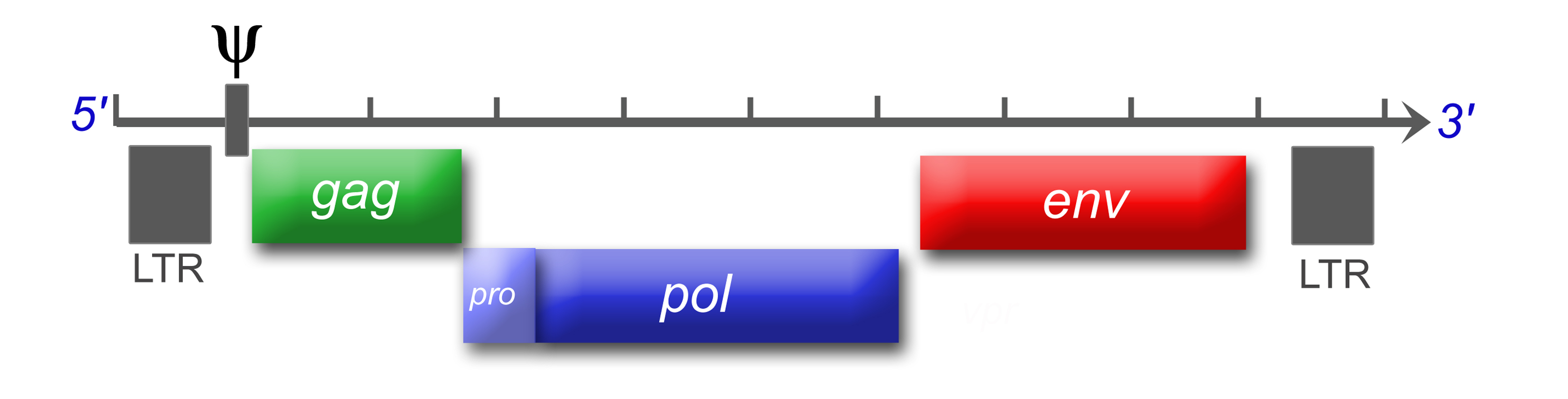 Schematischer Aufbau des Genoms von Retroviren